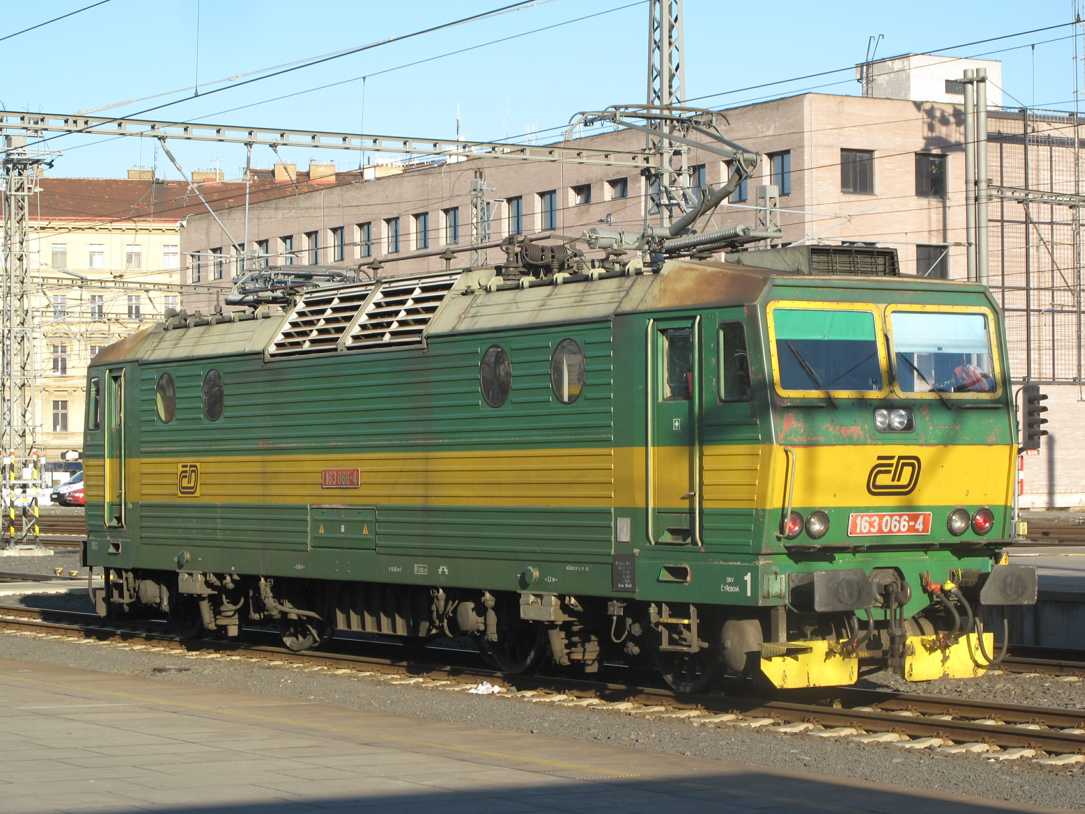 Hlavní nádraží, lokomotiva řady 163